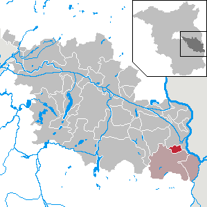 Lawitz in Brandenburg (Country) - District Oder-Spree